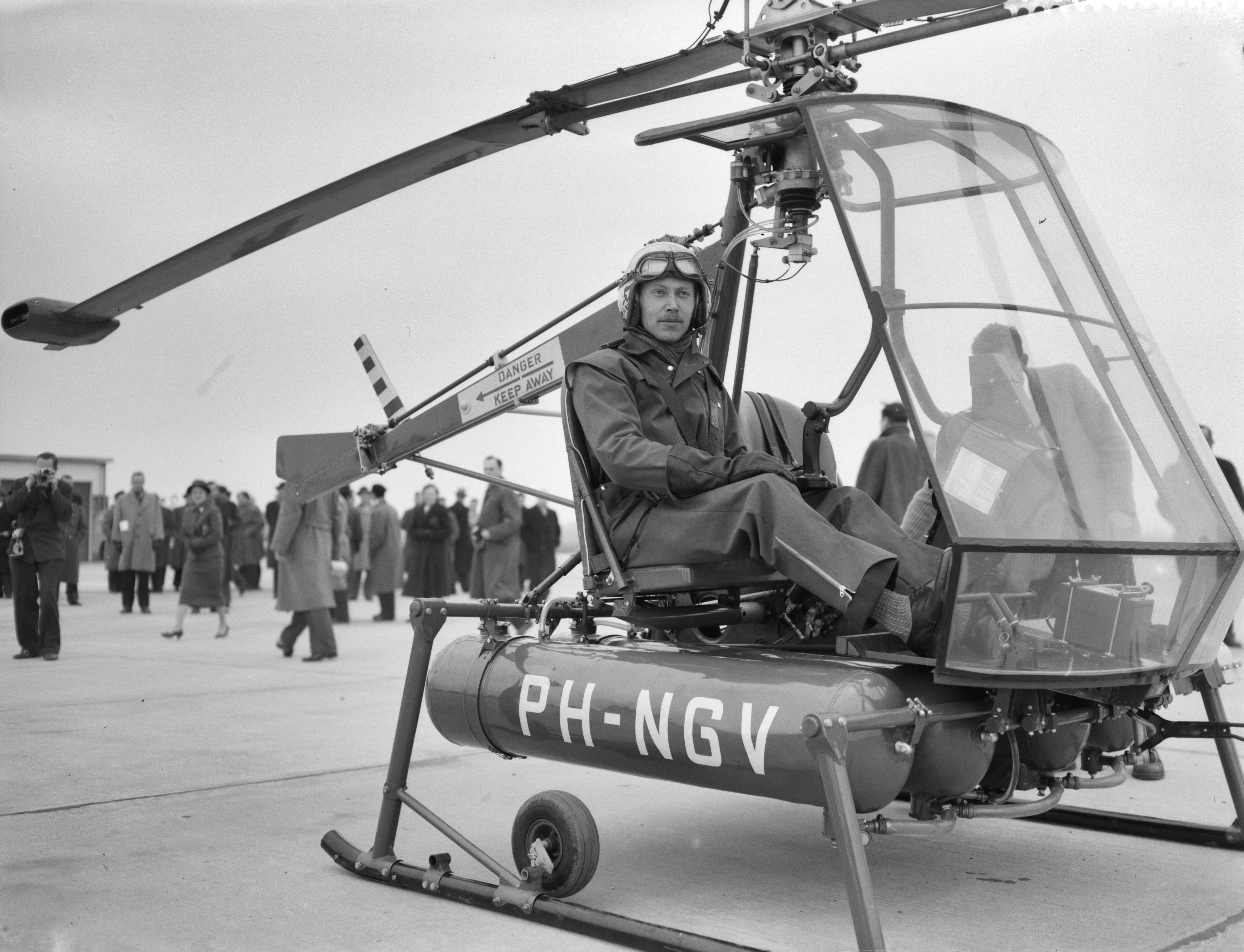 Collectie / Archief : Fotocollectie Anefo Reportage / Serie : [ onbekend ] Beschrijving : Uitreiking bewijs van Luchtvaardigheid voor de Kolibri op het vliegveld Zestienhoven te Rotterdam Datum : 3 maart 1958 Locatie : Rotterdam, Zuid-Holland Trefwoorden : Uitreikingen, bewijzen, vliegvelden Persoonsnaam : Kolibri Instellingsnaam : Zestienhoven Fotograaf : Rossem, Wim van / Anefo Auteursrechthebbende : Nationaal Archief Materiaalsoort : Negatief (zwart/wit) Nummer archiefinventaris : bekijk toegang 2.24.01.04 Bestanddeelnummer : 909-3782